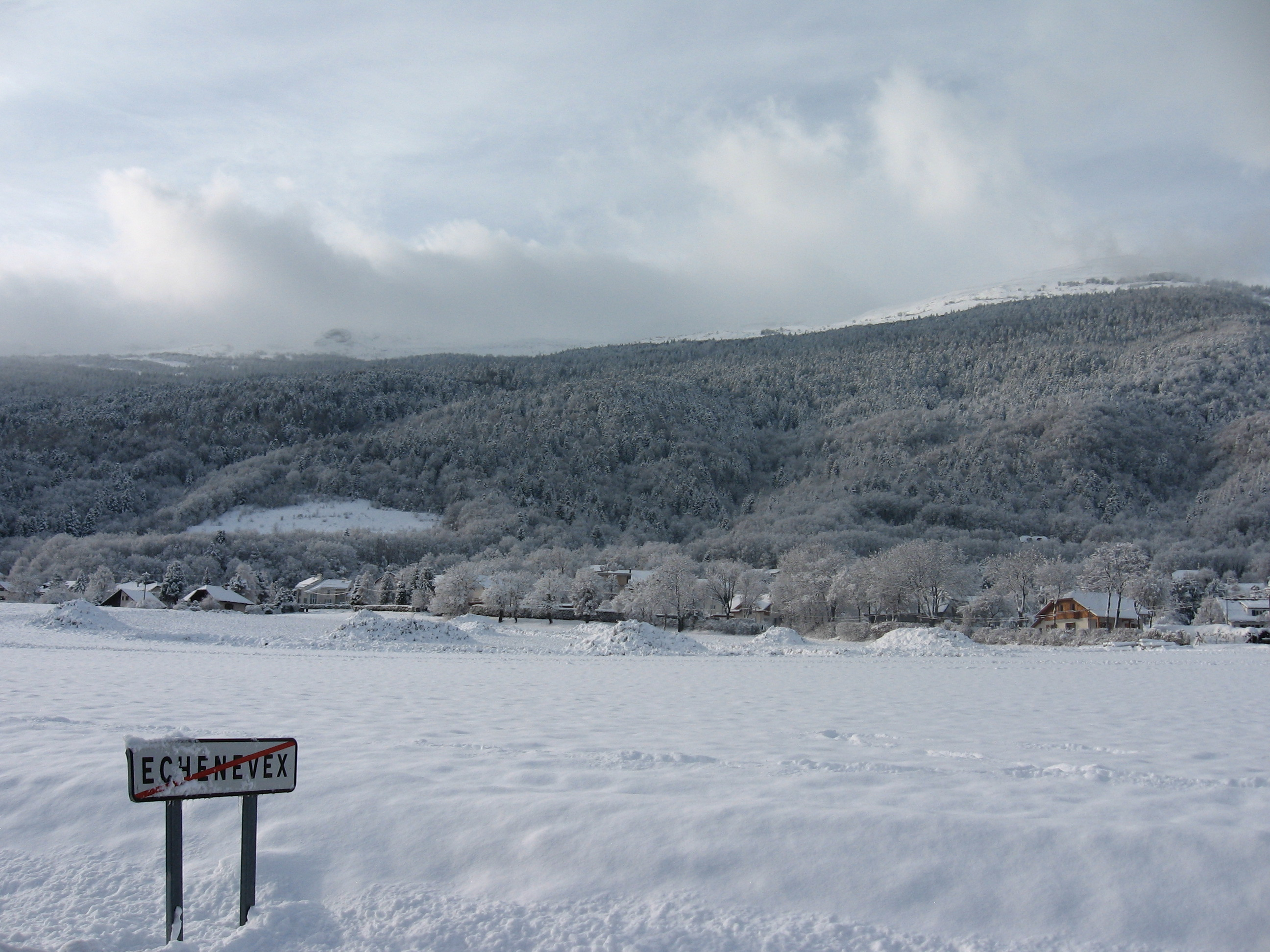 Echenevex sous la neige (photo prise du Chemin des Couilloux, près de la caserne des pompiers)